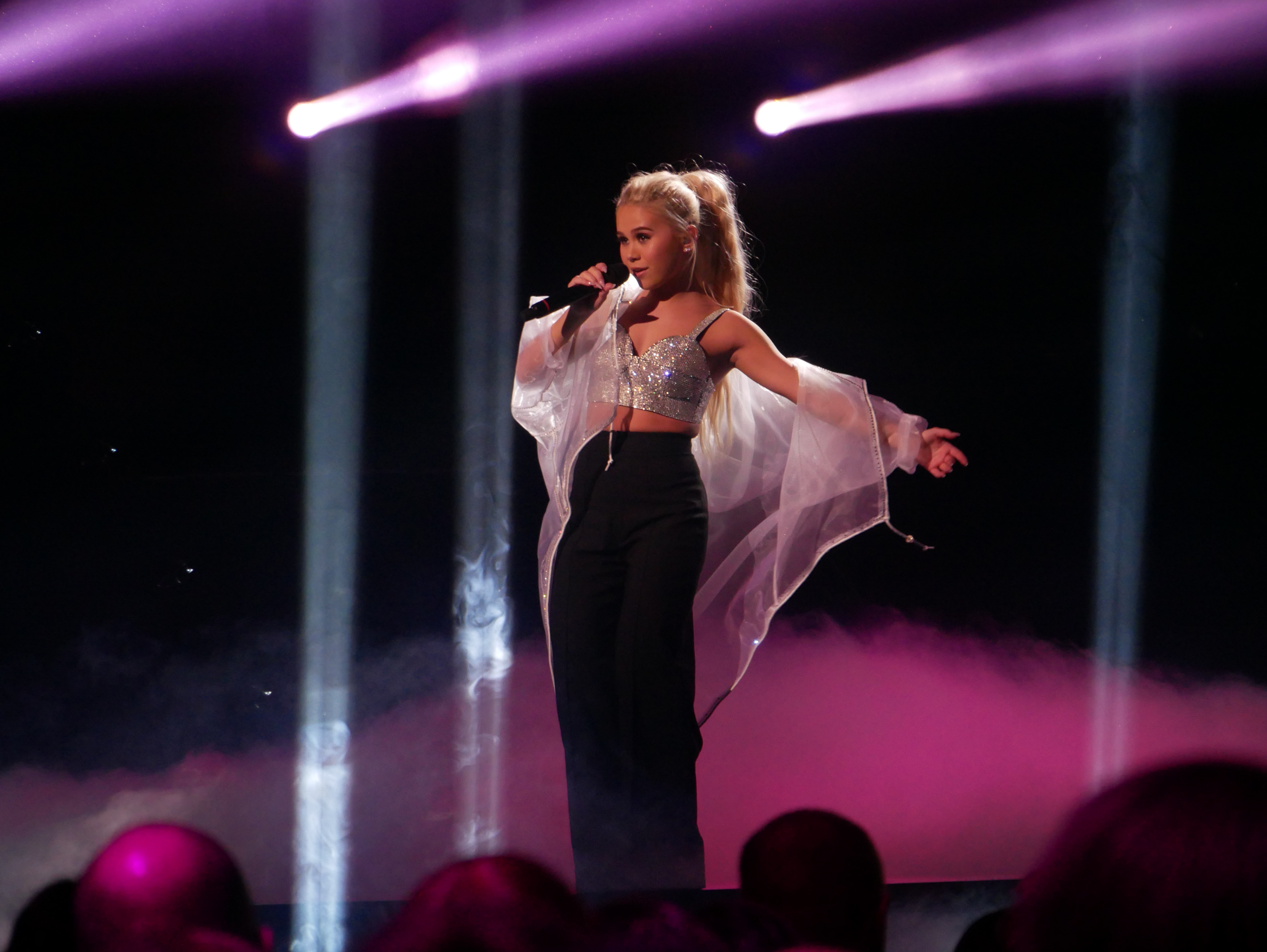 Lisa Ajax, Melodifestivalen 2017, deltävling 2